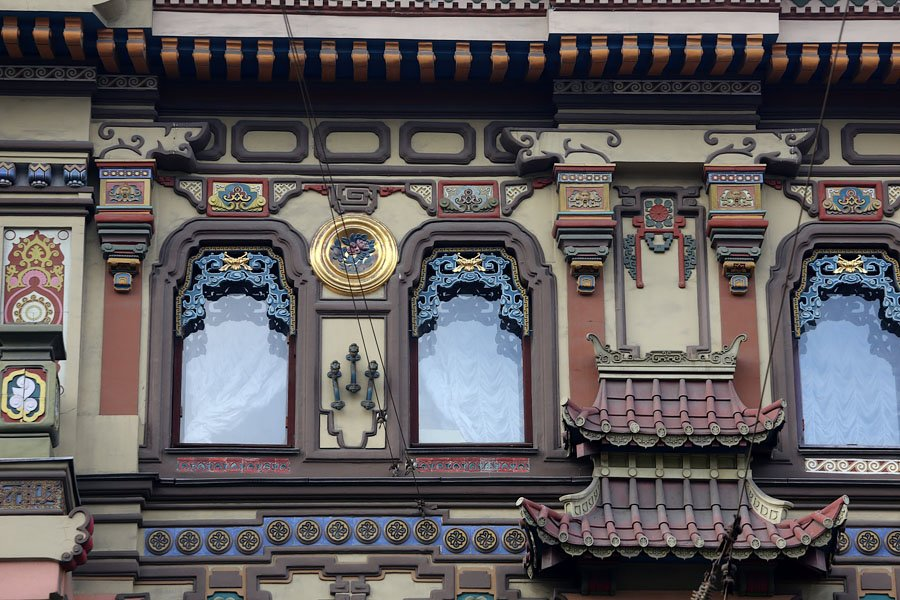 Декор фасада Чайного магазина Перлова